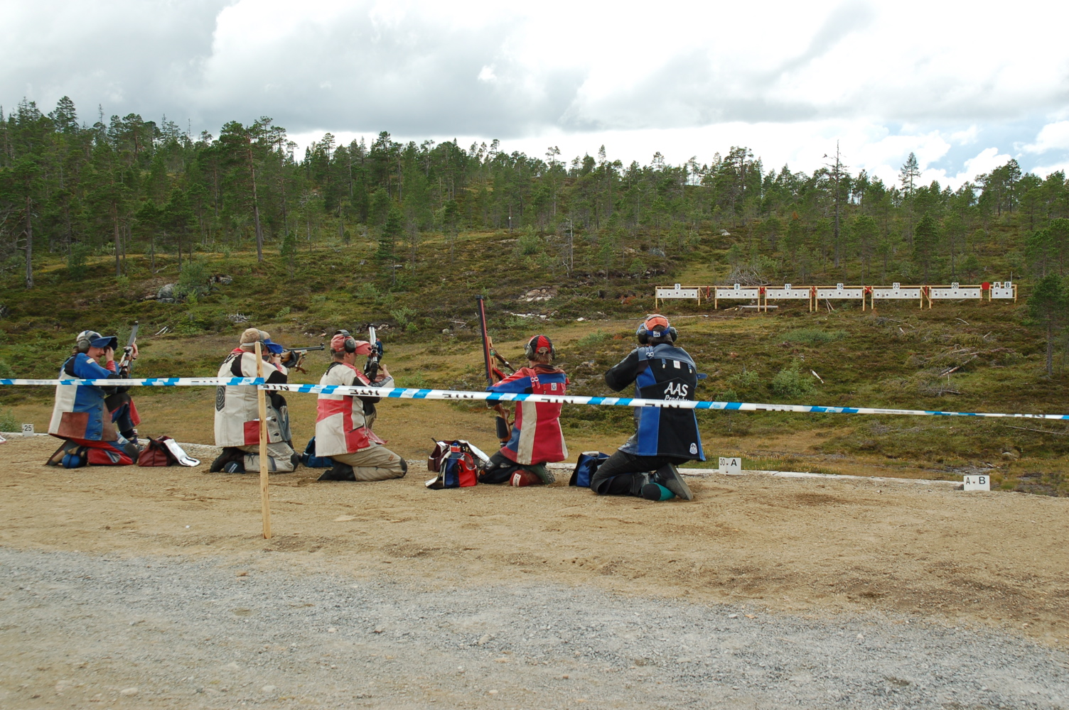 Minneskyting, LS 2007